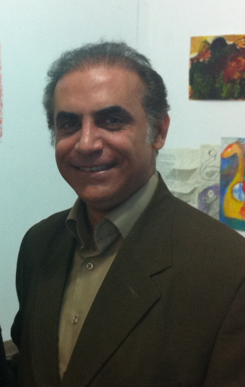 مسعود خادم ۱۳۹۳/۱۱/۱۹